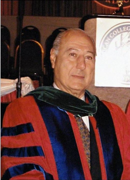 El Dr. Esper nominado Fellow del American College